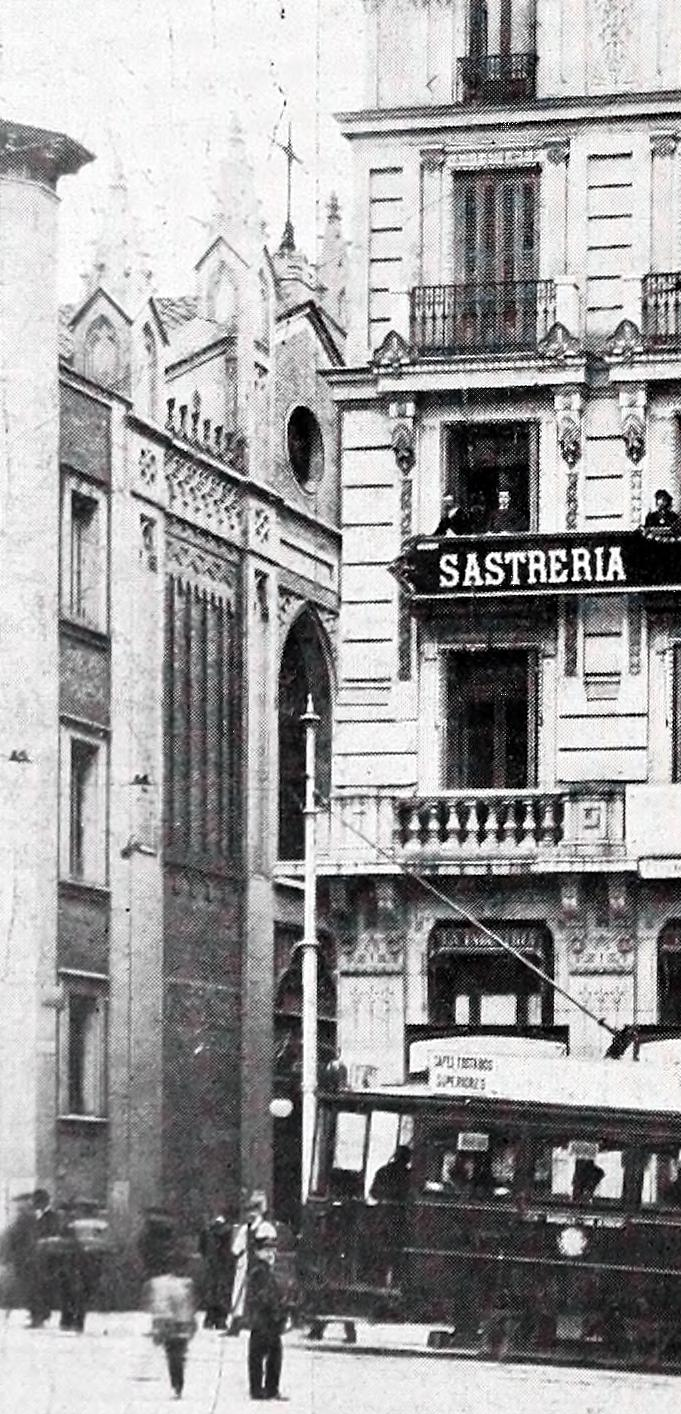 Sastrería norteamericana. Carrera de San Jerónimo, 43, 1.°, Madrid.